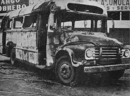 Colectivo Bedford carrozado por Master Automotor, perteneciente al Ente Regulador de Empresas Coordinadas Sanlorencinas (por el tono cromático del guardabarros, presumiblemente de la empresa 9 de Julio o de la Sargento Cabral) incendiado sobre las vías del Ferrocarril General Mitre, en el Cruce Alberdi